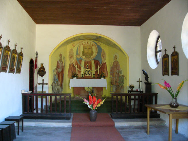 Das Foto zeigt den Innenraum der kleinen Kapelle zu Ehren des Heiligen Gangolfs auf der Milseburg.